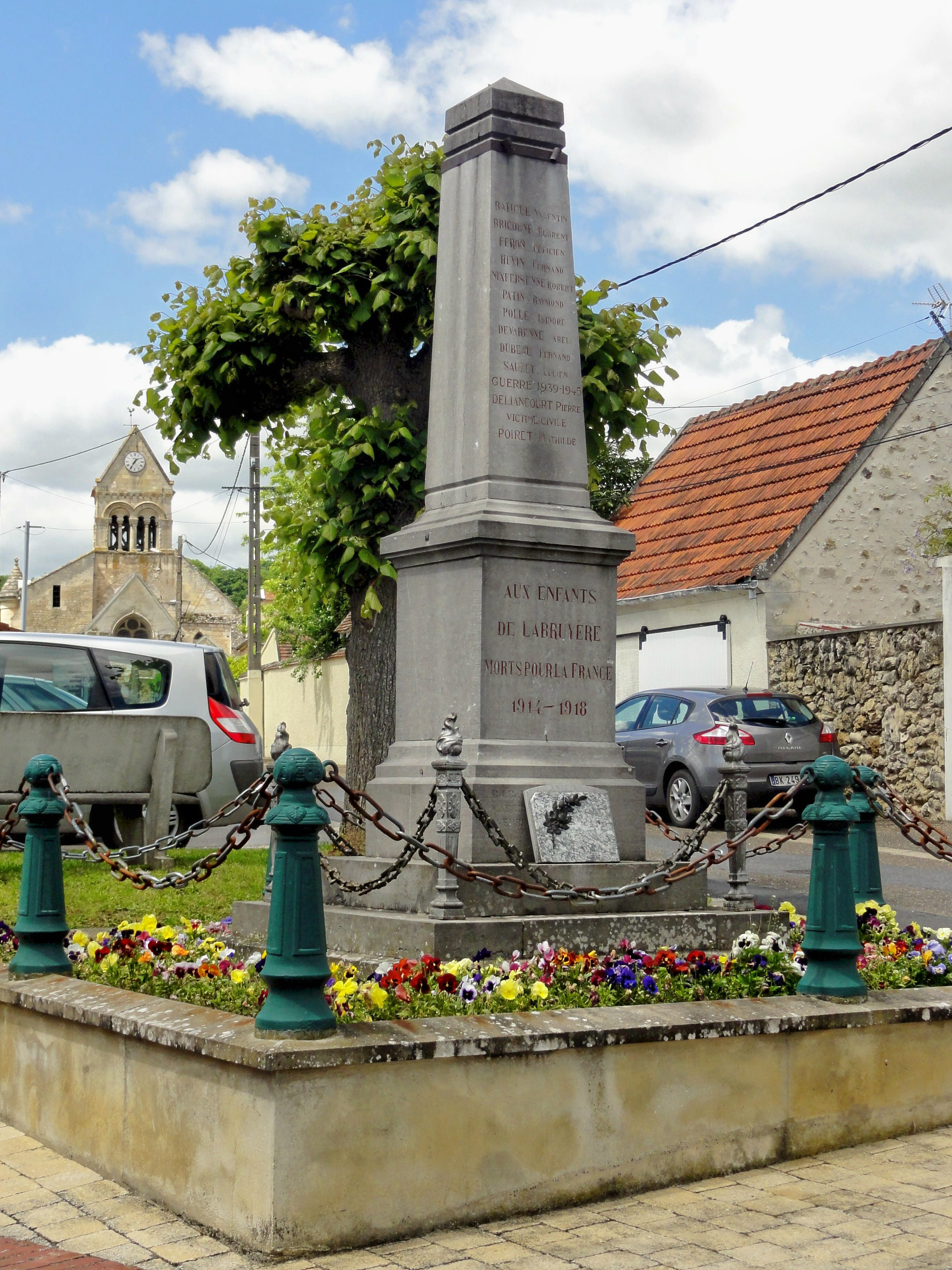 Monument aux morts, rue du colonel Fabien.